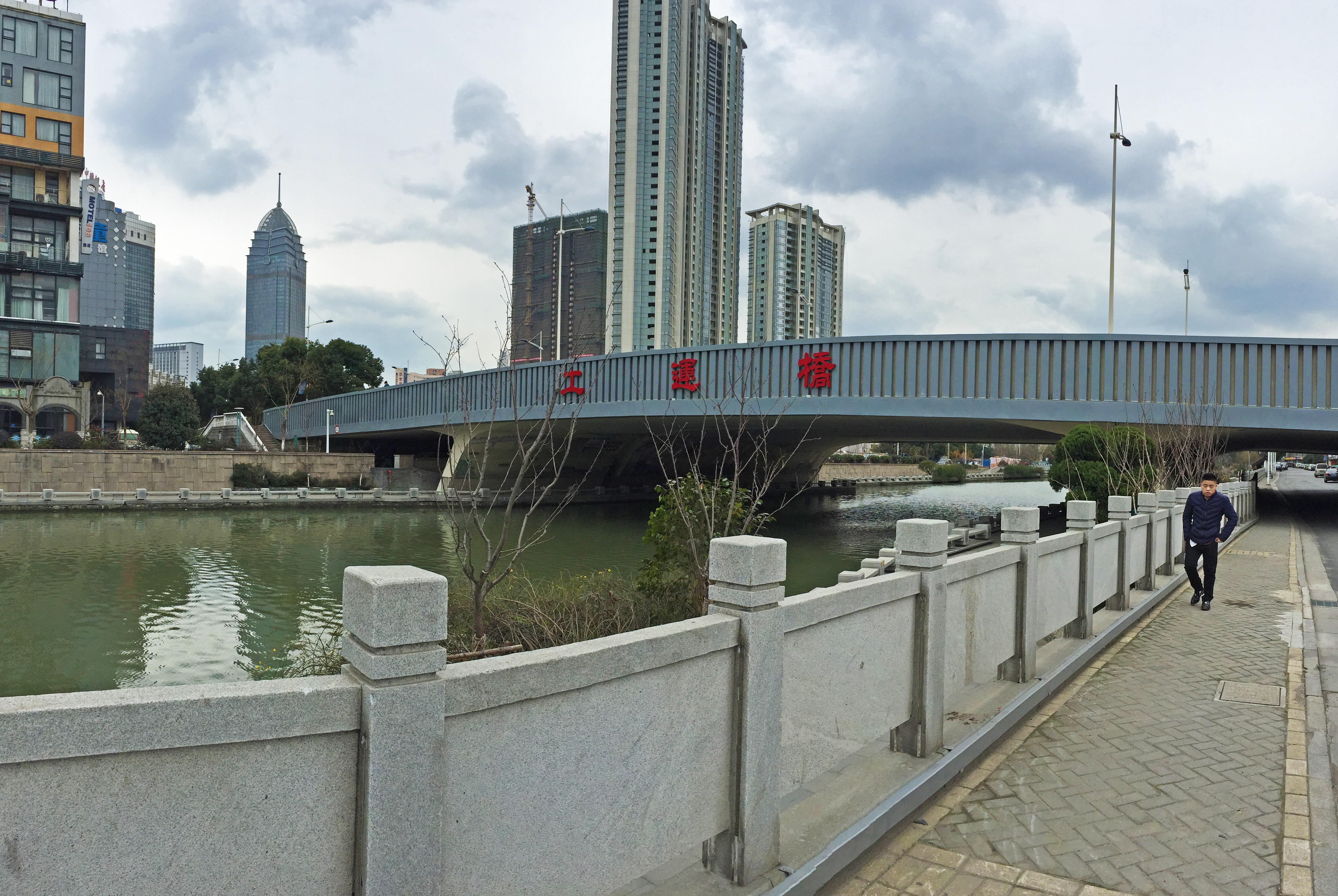 工運橋-無錫